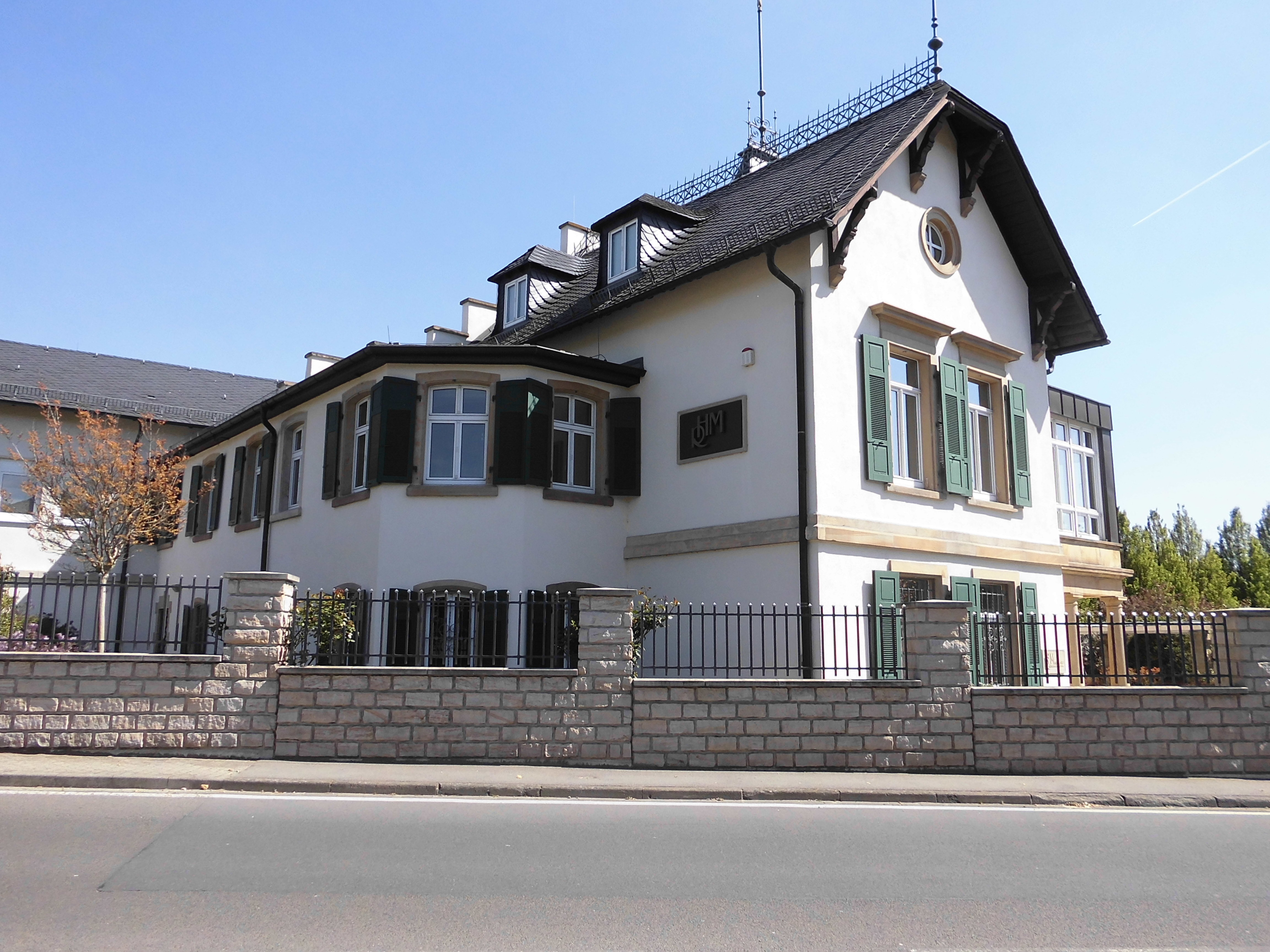 Deidesheim Weinstraße 1